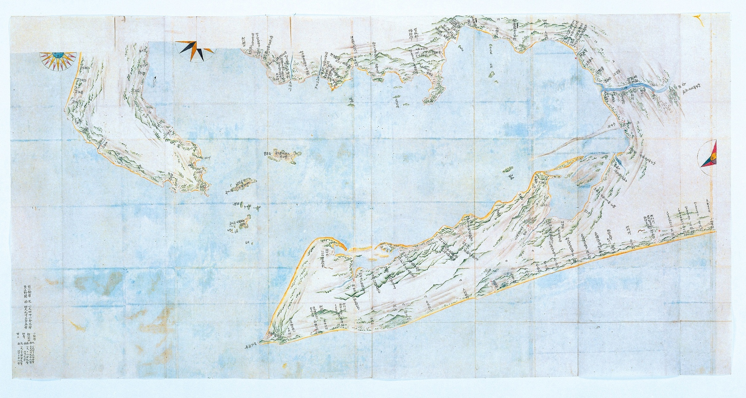 大日本沿海輿地全図 大図 渥美半島付近 千葉県香取市 伊能忠敬記念館所蔵 伊能忠敬記念館公式サイト 資料画像提供ページ（ 上下左右トリミング